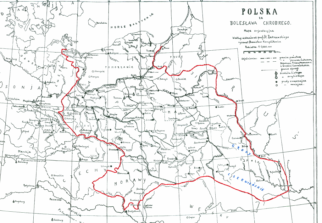 Mapa Polski z lat 1018-1031 za Bolesława Chrobrego i Mieszka II według prof. Stanisława Zakrzewskiego ("Bolesław Chrobry Wielki", 1925).